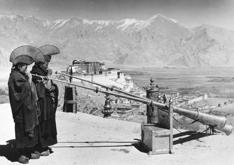 Tibetexpedition, Mönche mit Blasinstrumenten Lhasa (Neujahr), Tubenbläser mit Potala, Lamas blasen das Neujahrsfest ein [Blasinstrument, im Hintergrund Potala]